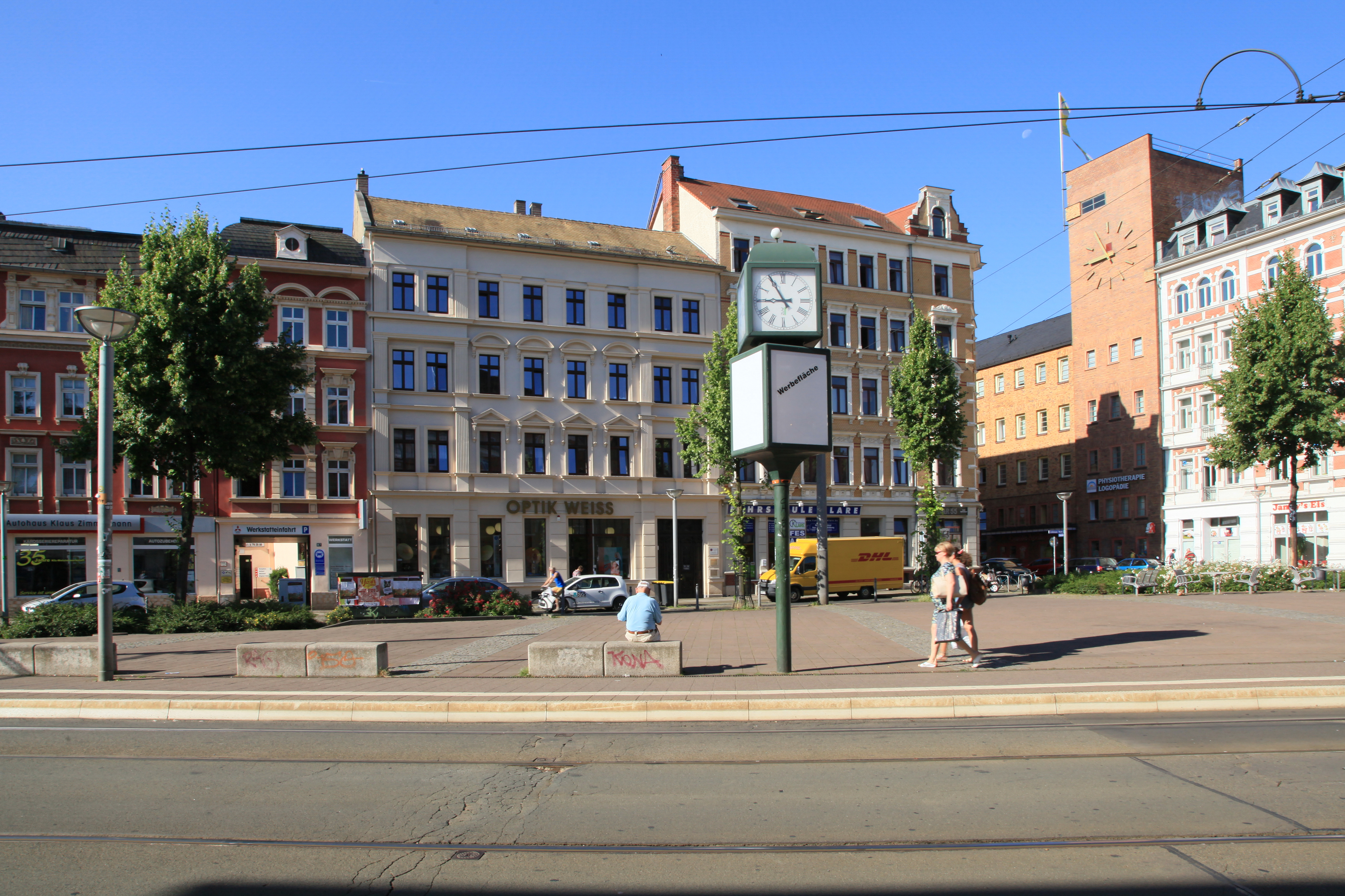 Lindenauer Markt und Marktstraße mit Westbad in Leipzig